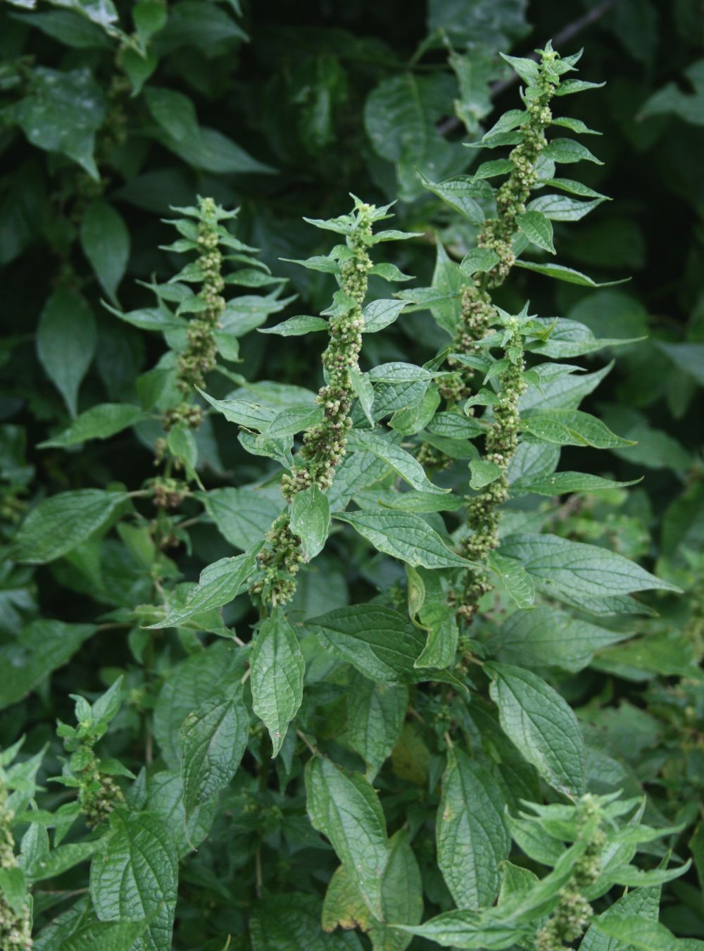 Aufrechtes Glaskraut (Parietaria officinalis), Brennnesselgewächse (Urticaceae) - Österreich/Austria/Autriche: Niederösterreich, Eichkogel S Mödling